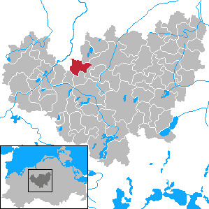 Mistorf in Mecklenburg-Vorpommern - District Güstrow